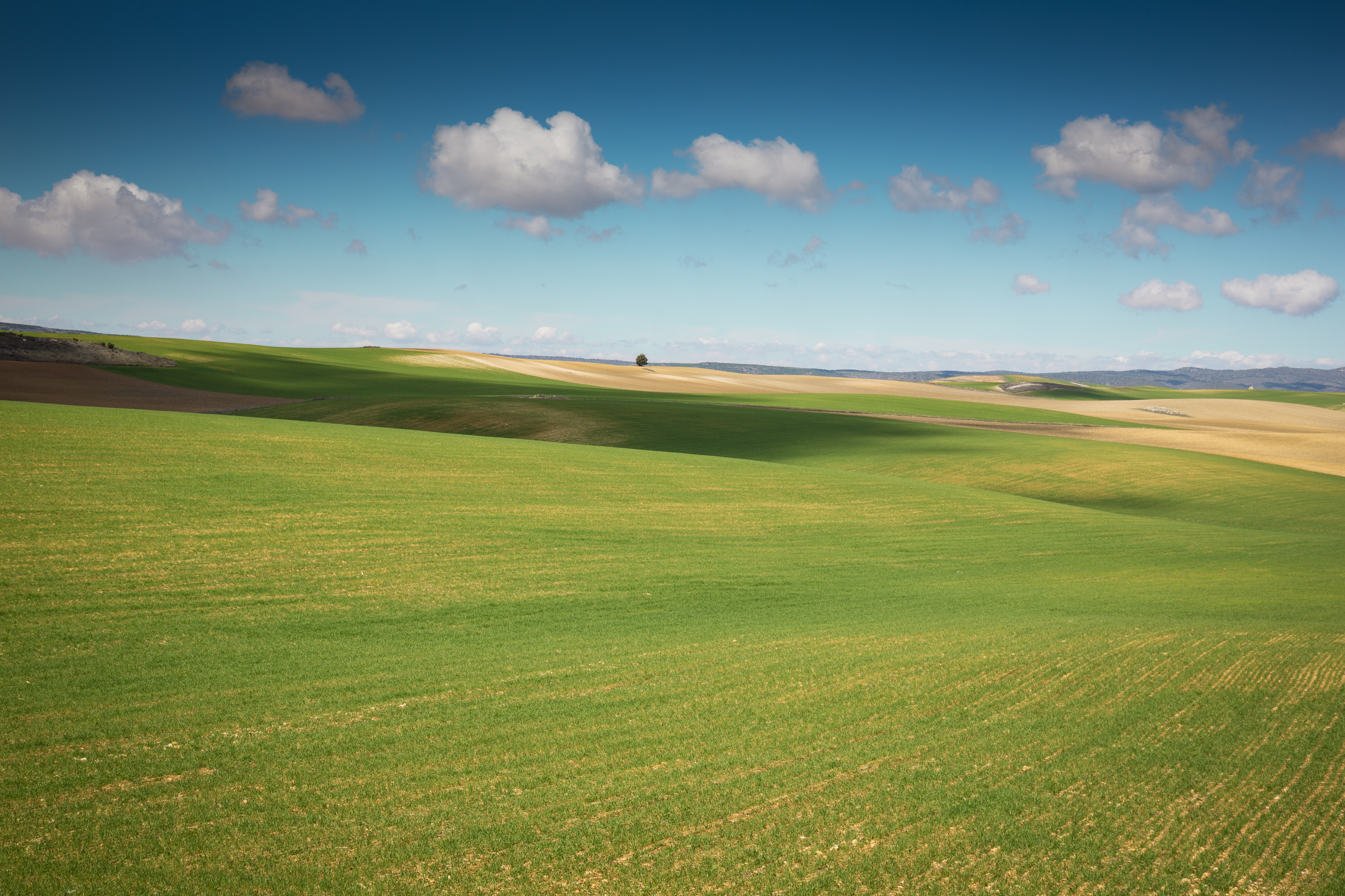 Cuenca province, Spain